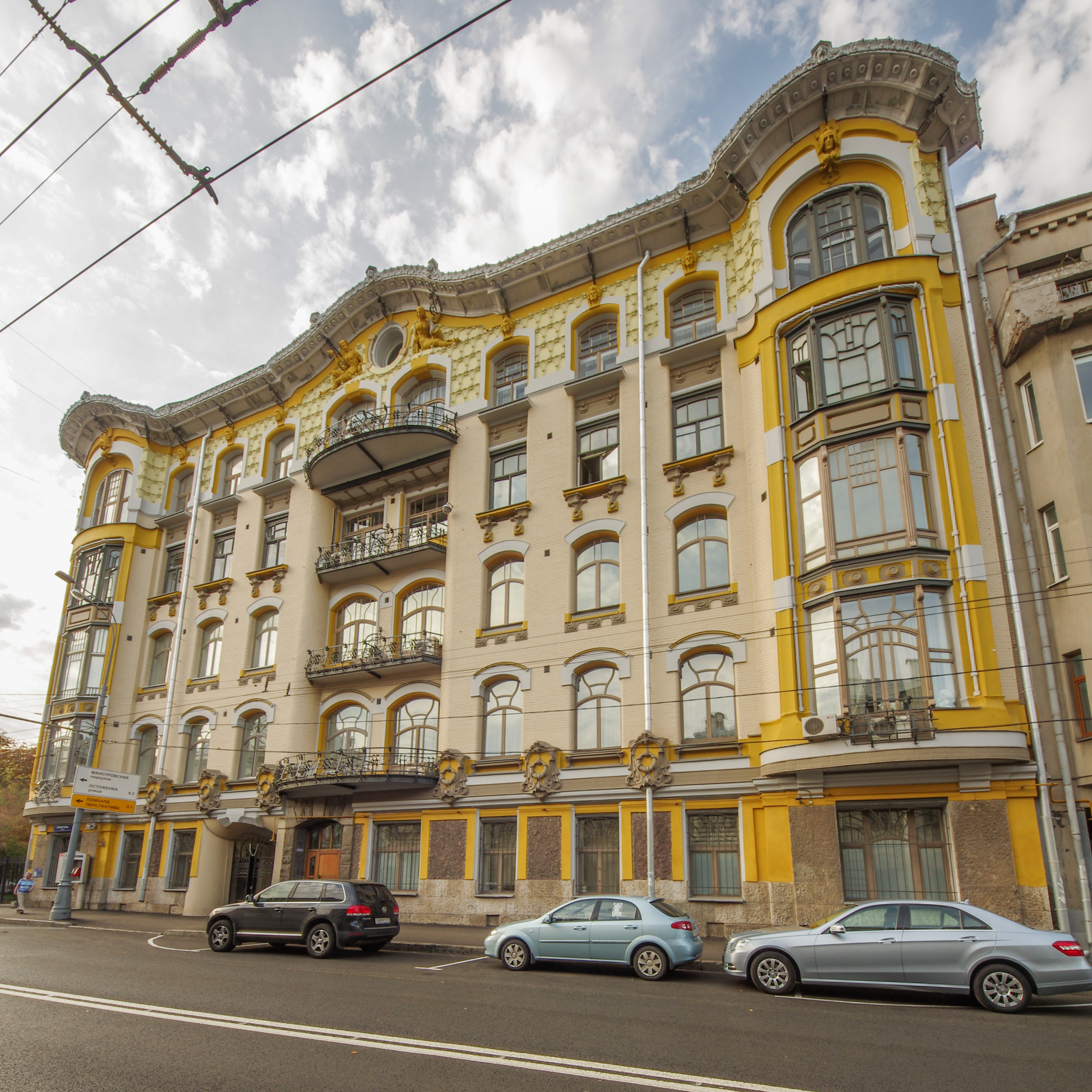 Доходный дом Исакова на Пречистенке: Пречистенка ул., дом 28, Хамовники, Центральный округ, Москва